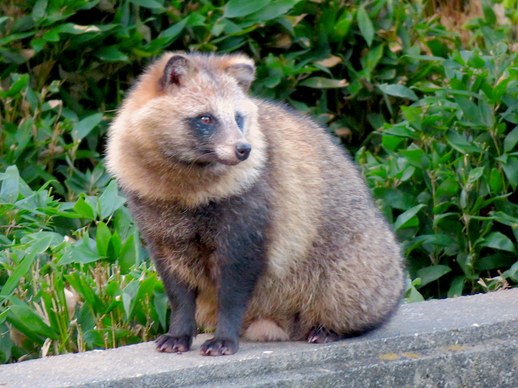 東山動植物園のタヌキ（ホンドタヌキ）。